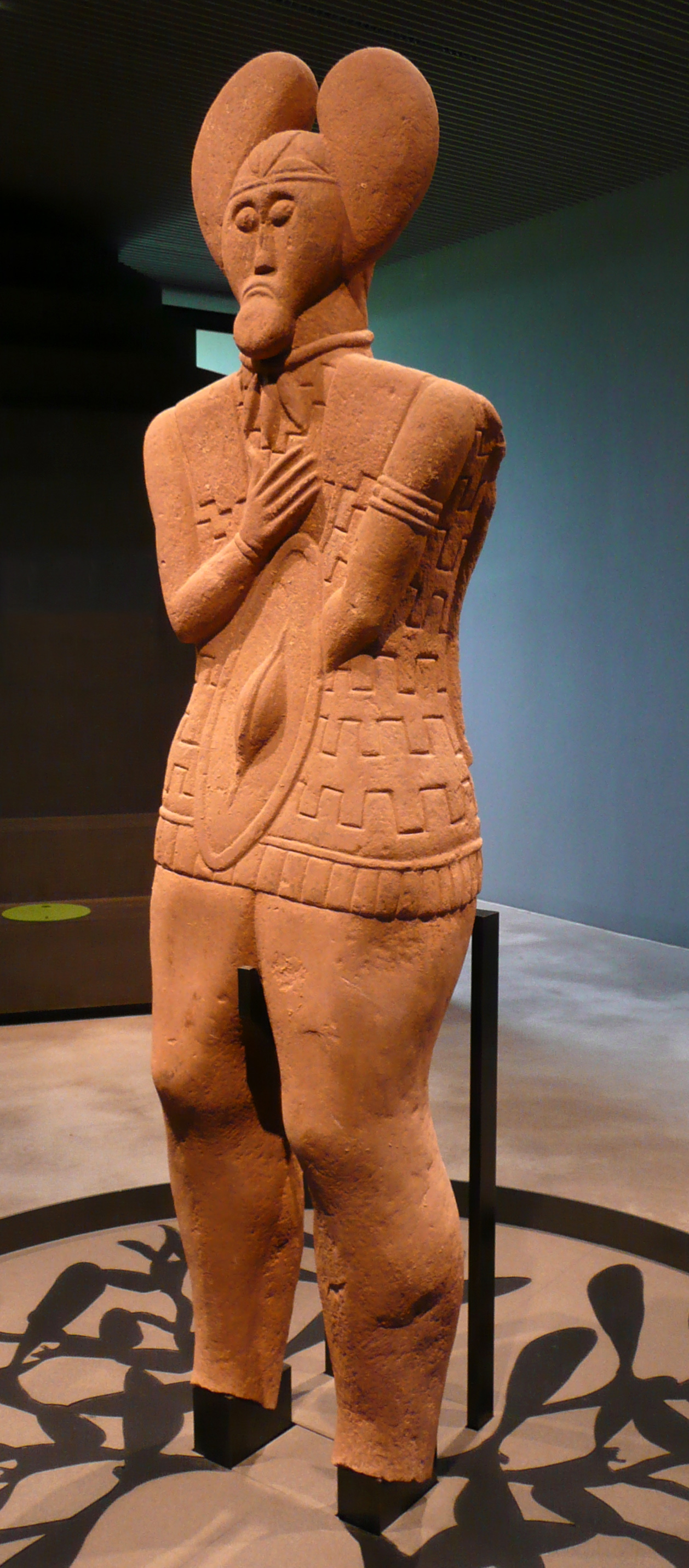 Lebensgroße Sandsteinstatue des 'Keltenfürst vom Glauberg' aus Grab 1 am Glauberg in Hessen, ca. 500 v. Chr., Ansicht von vorne rechts. Ausstellungort: Museum Keltenwelt am Glauberg.